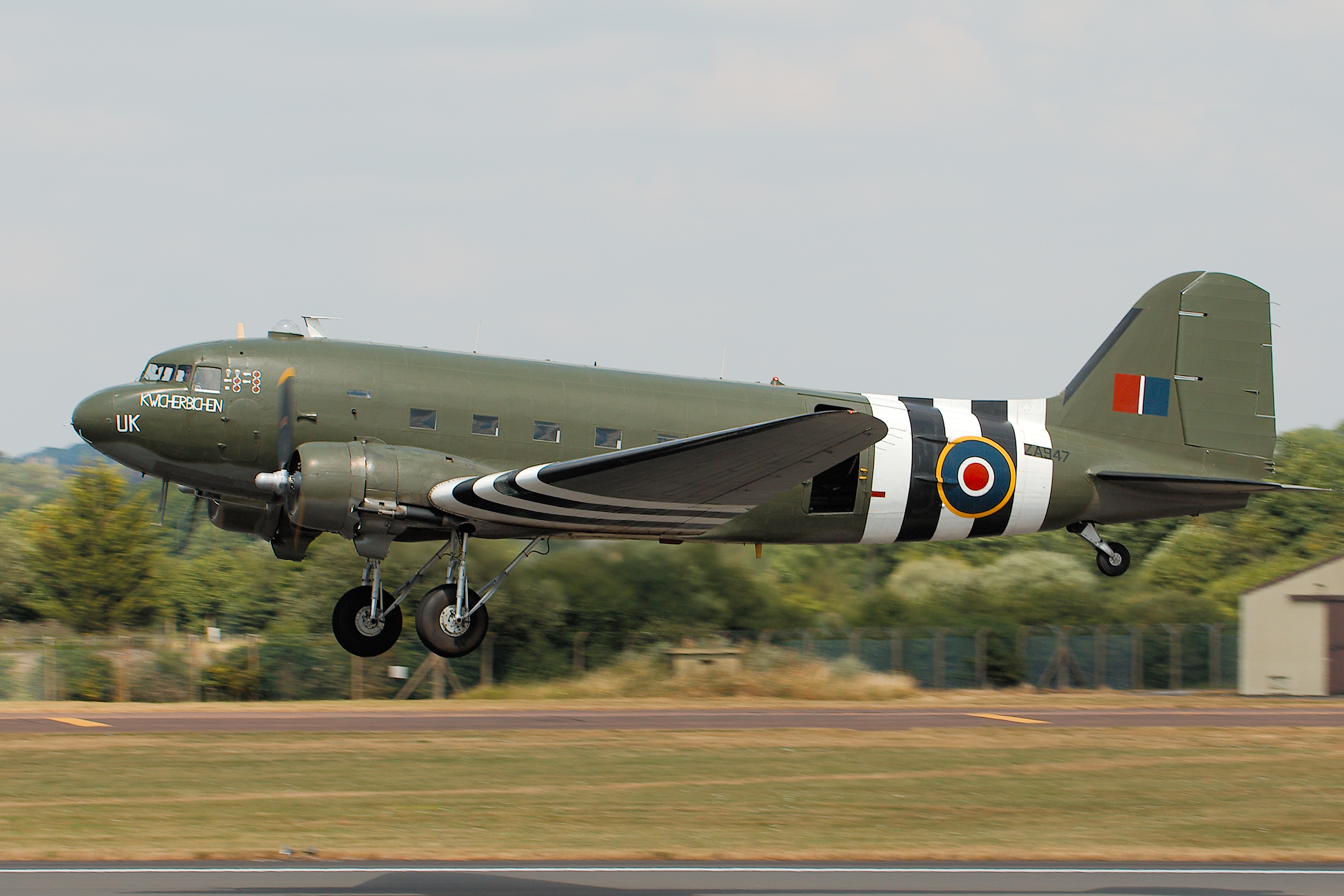 Dakota - RIAT 2018